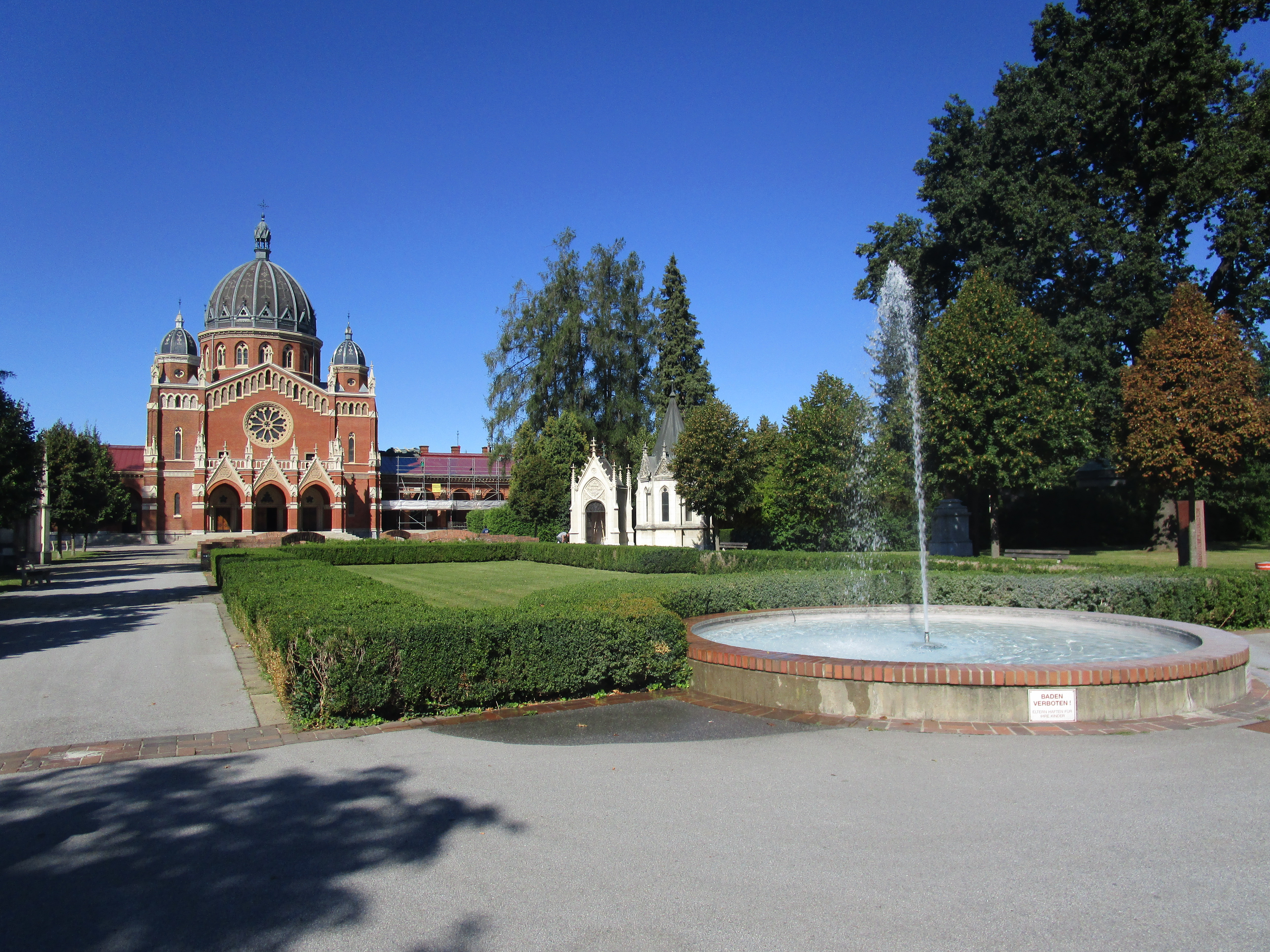 Zentralfriedhof Graz mit Kirche zum gekreuzigten Heiland